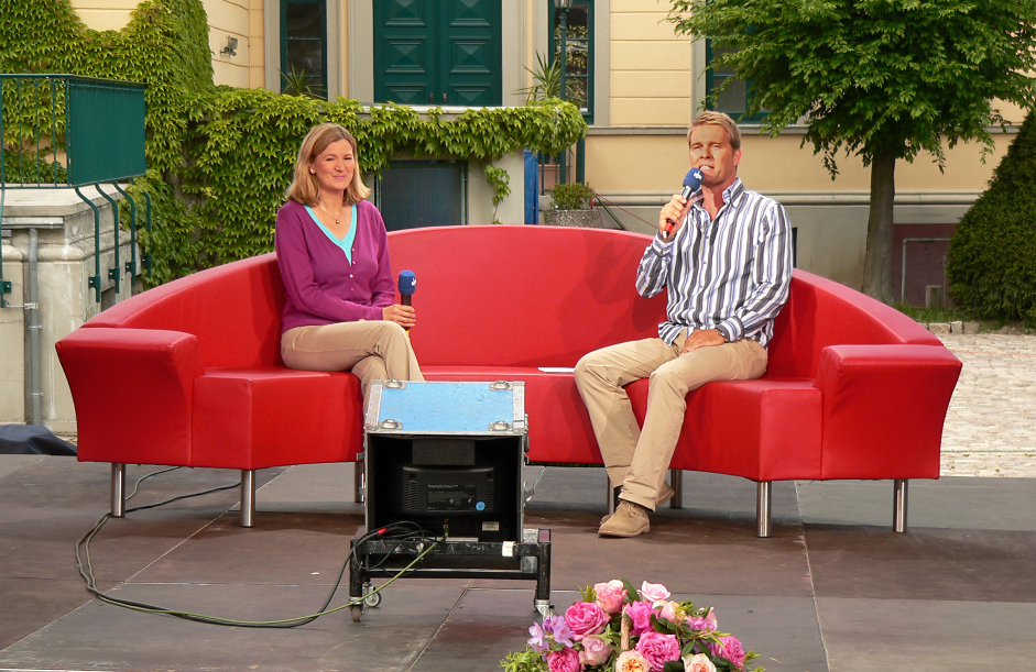 Das! in Springe